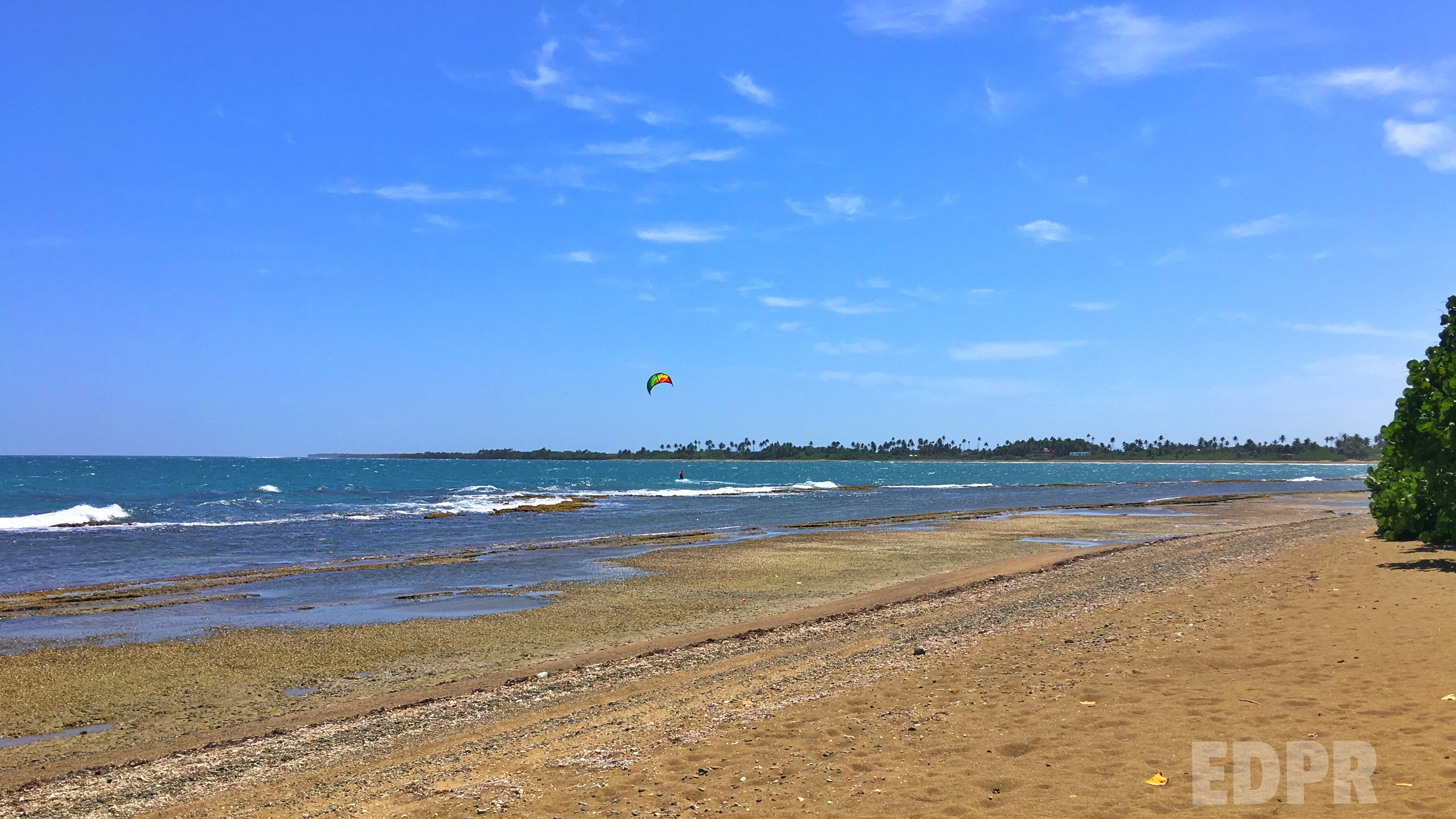 Punta Pozuelo